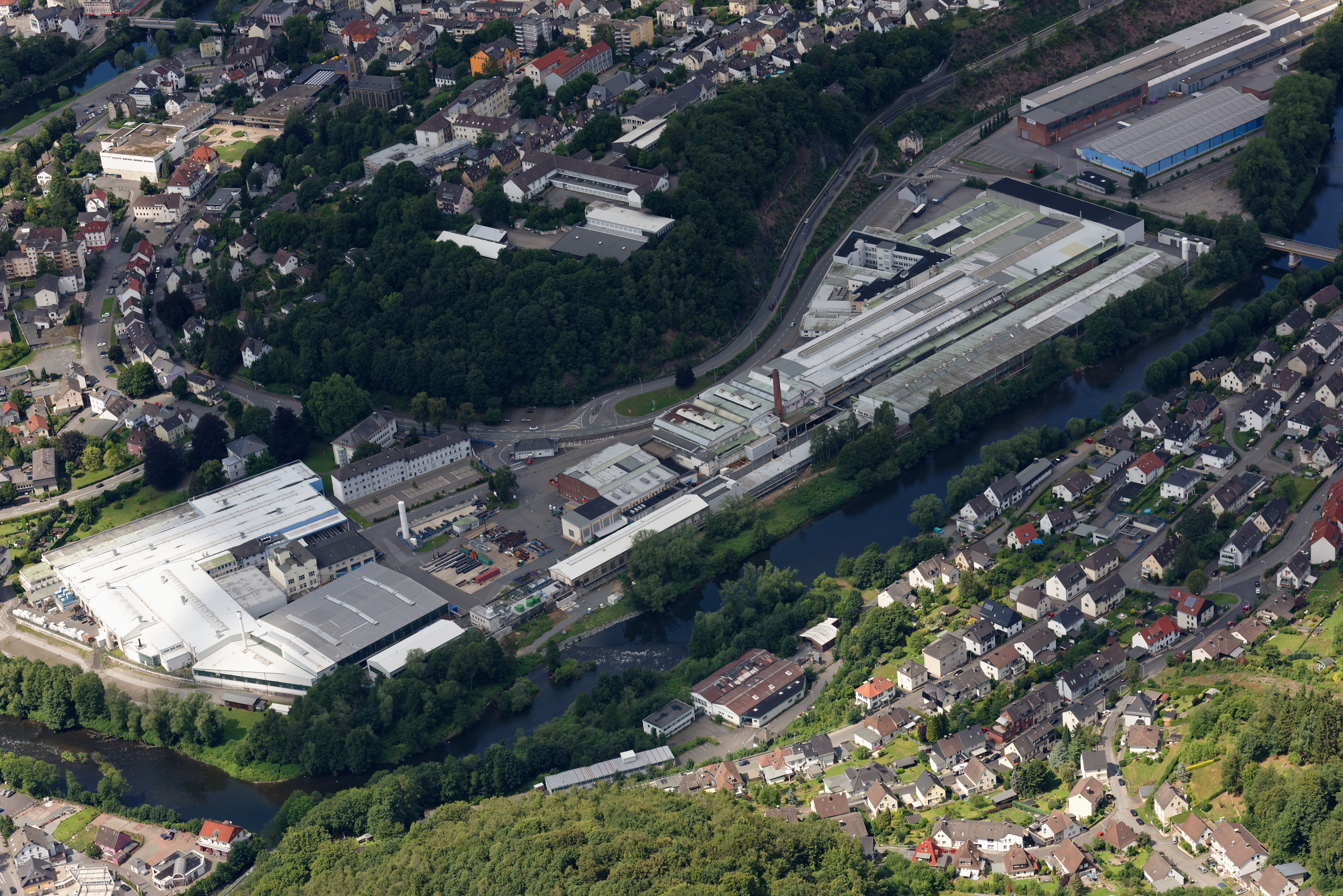 Luftaufnahme: Werdohl, Lenne, Werksgelände der Fa. VDM Metals, Bundesstraße 236, Nordrhein-Westfalen